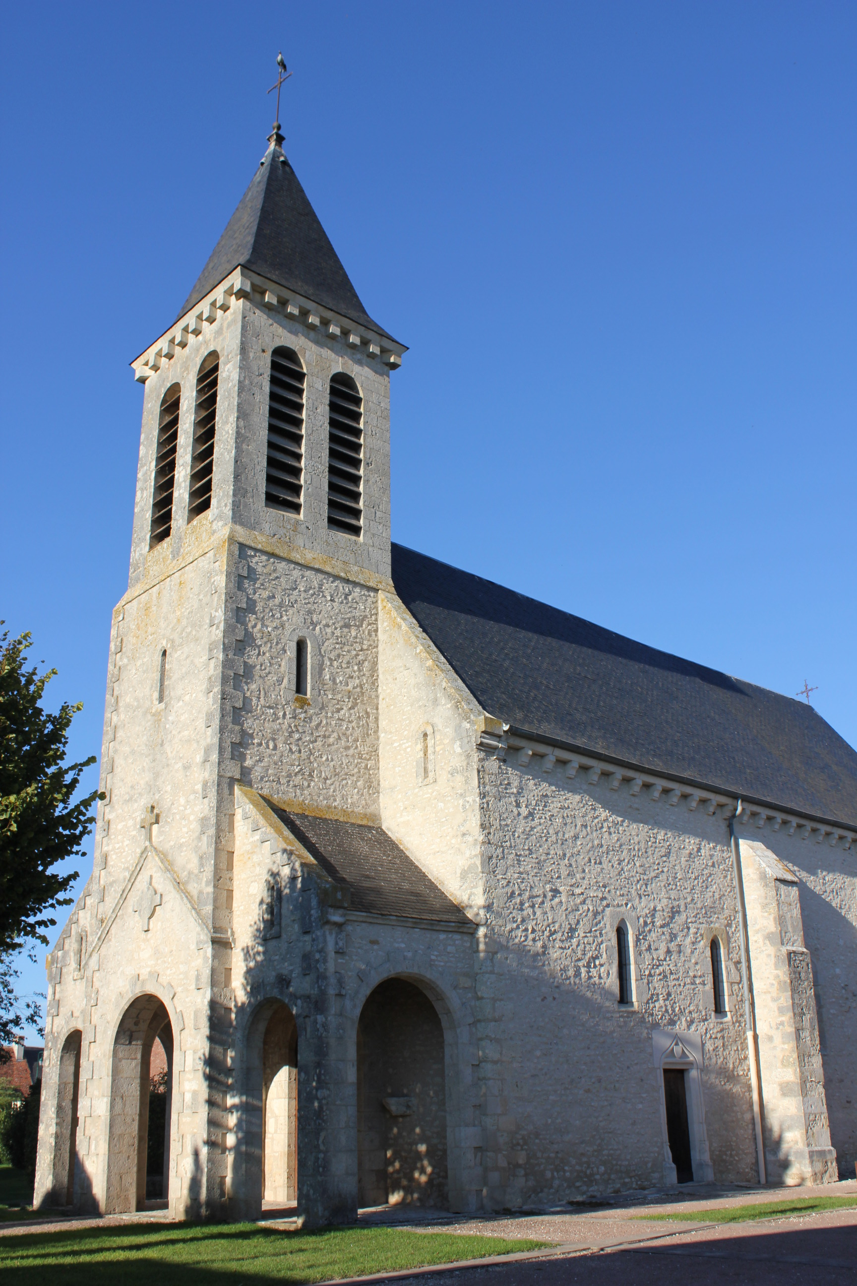 Église de Saint-Loup-des-Chaumes (département du Cher, France).